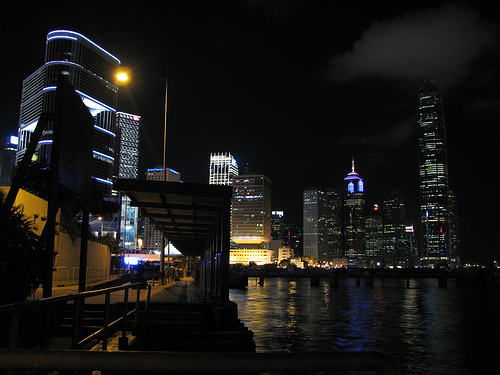 Hong Kong 2006 Night